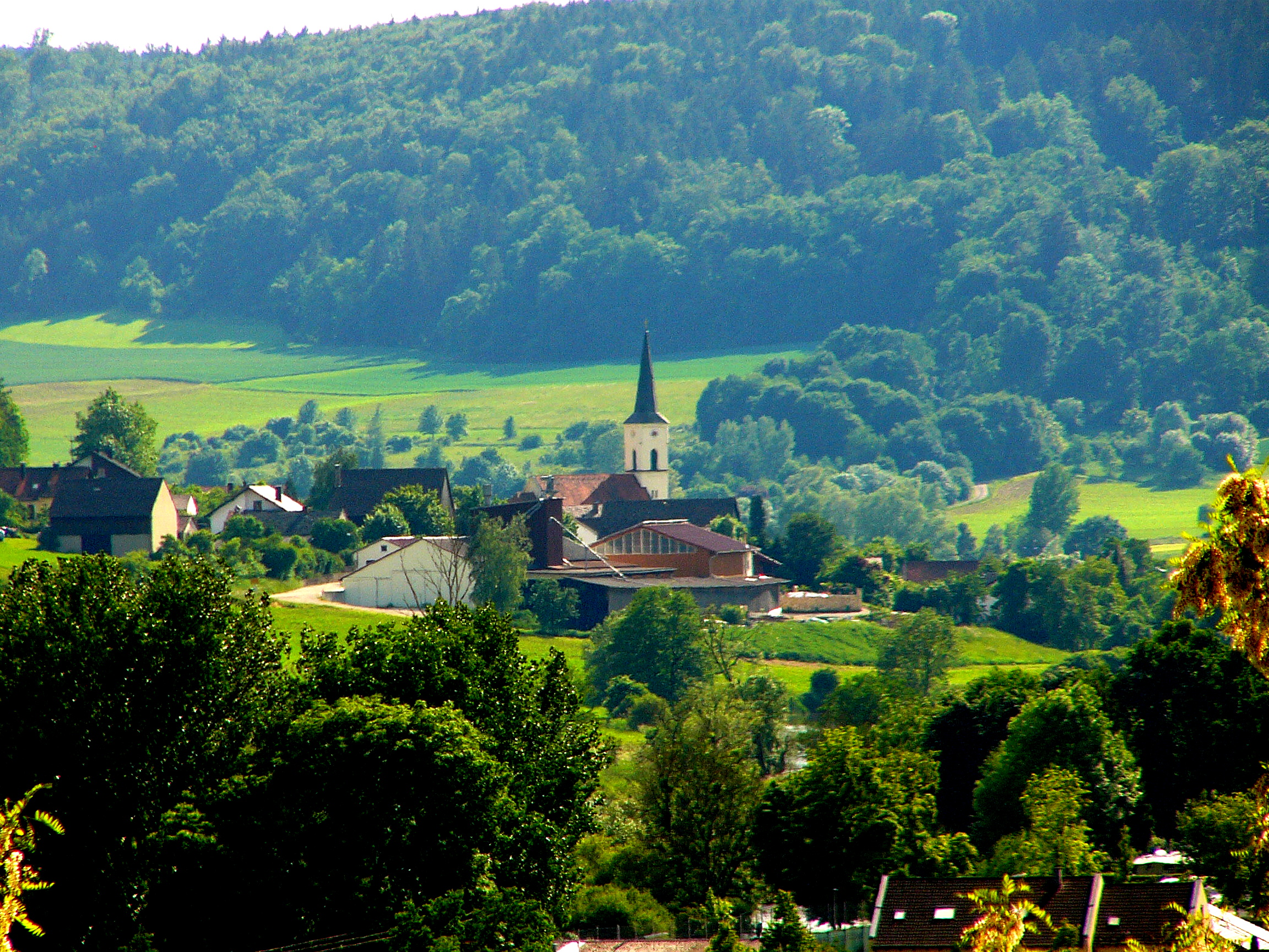 Blick auf Kirchanhausen, Ortsteil von Beilngries